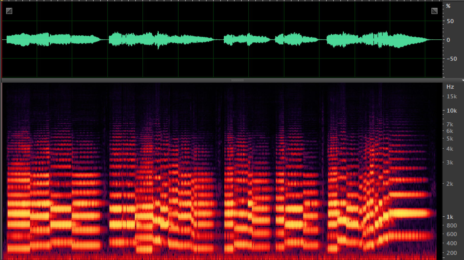 Especrtograma harmònic